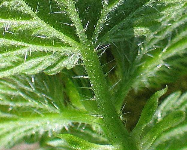 Author: soebe Date: August 04, 2004 Location: Eckernförde, Northern Germany Taken by Soebe in Northern Germany (Eckernförde) and released under GNU FDL. Beschreibung: Die Brennhaare auf der Blattunterseite und am Blattstiel weisen an der Basis eine Verdickung auf, in der sich die Brennflüssigkeit befindet.